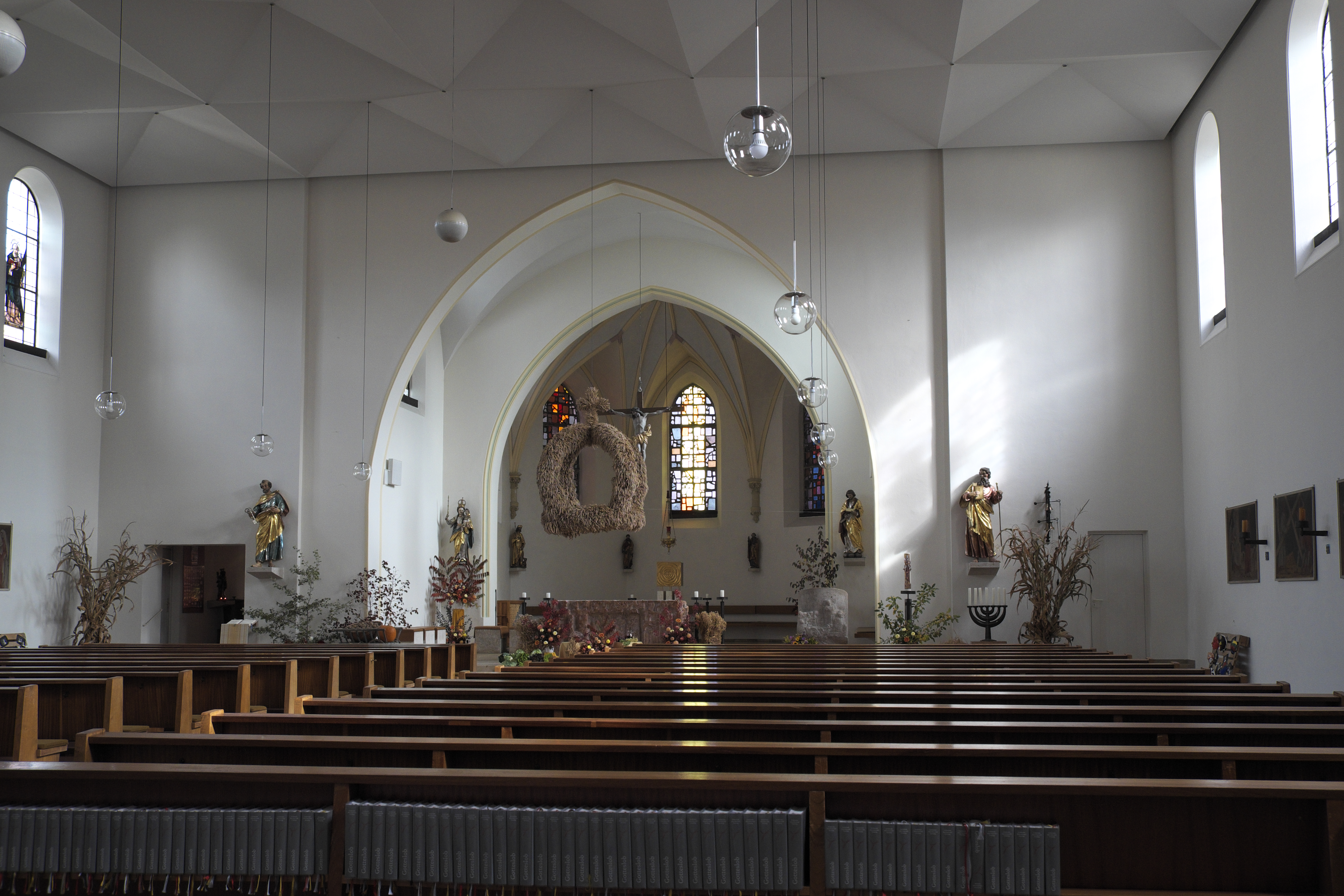 Katholische Pfarrkirche St. Peter und Paul in Feldmoching im Stadtbezirk Feldmoching-Hasenbergl in München (Bayern/Deutschland), Innenraum